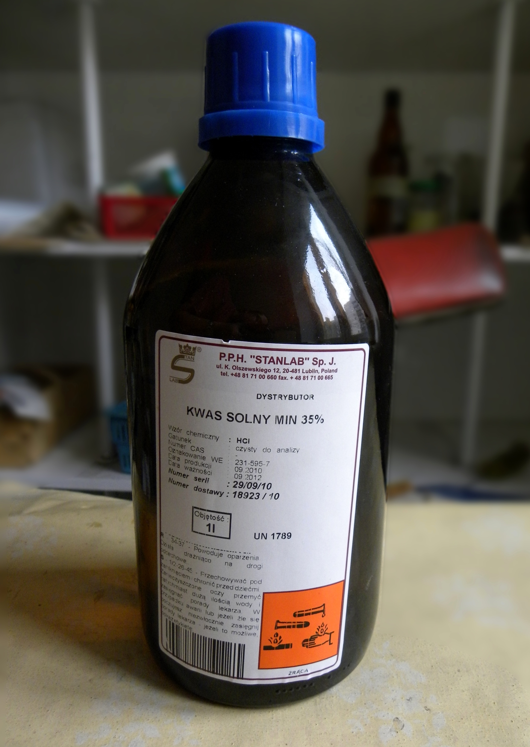 Kwas solny stężony